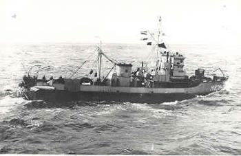 De Hr.Ms. Volkerak vaart door de zee.